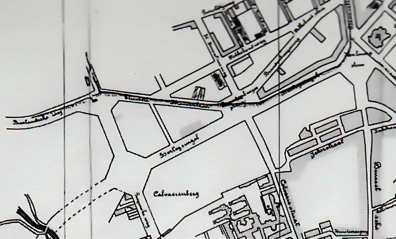 Detail van een plattegrond van Maastricht in 1914 met de omgeving Tongerseplein, Hertogsingel, Koningin Emmaplein. Collectie Gemeentearchief Maastricht.